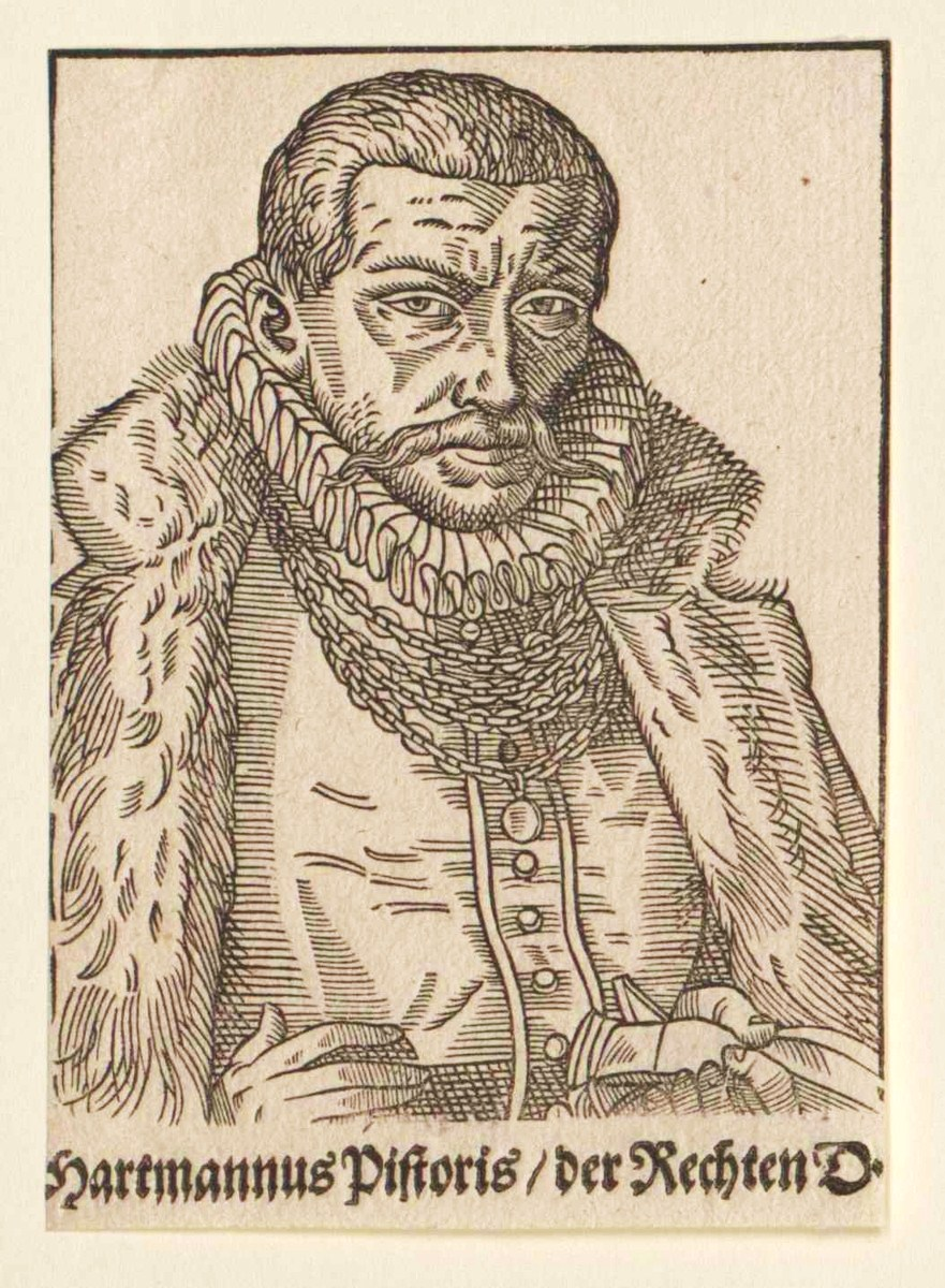 Scan aus dem Bildarchiv Austria